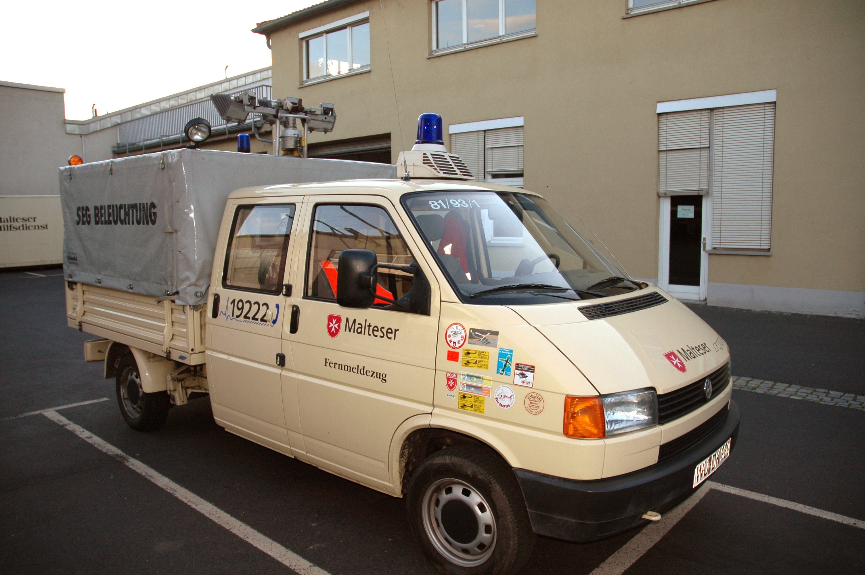 GW-Licht.